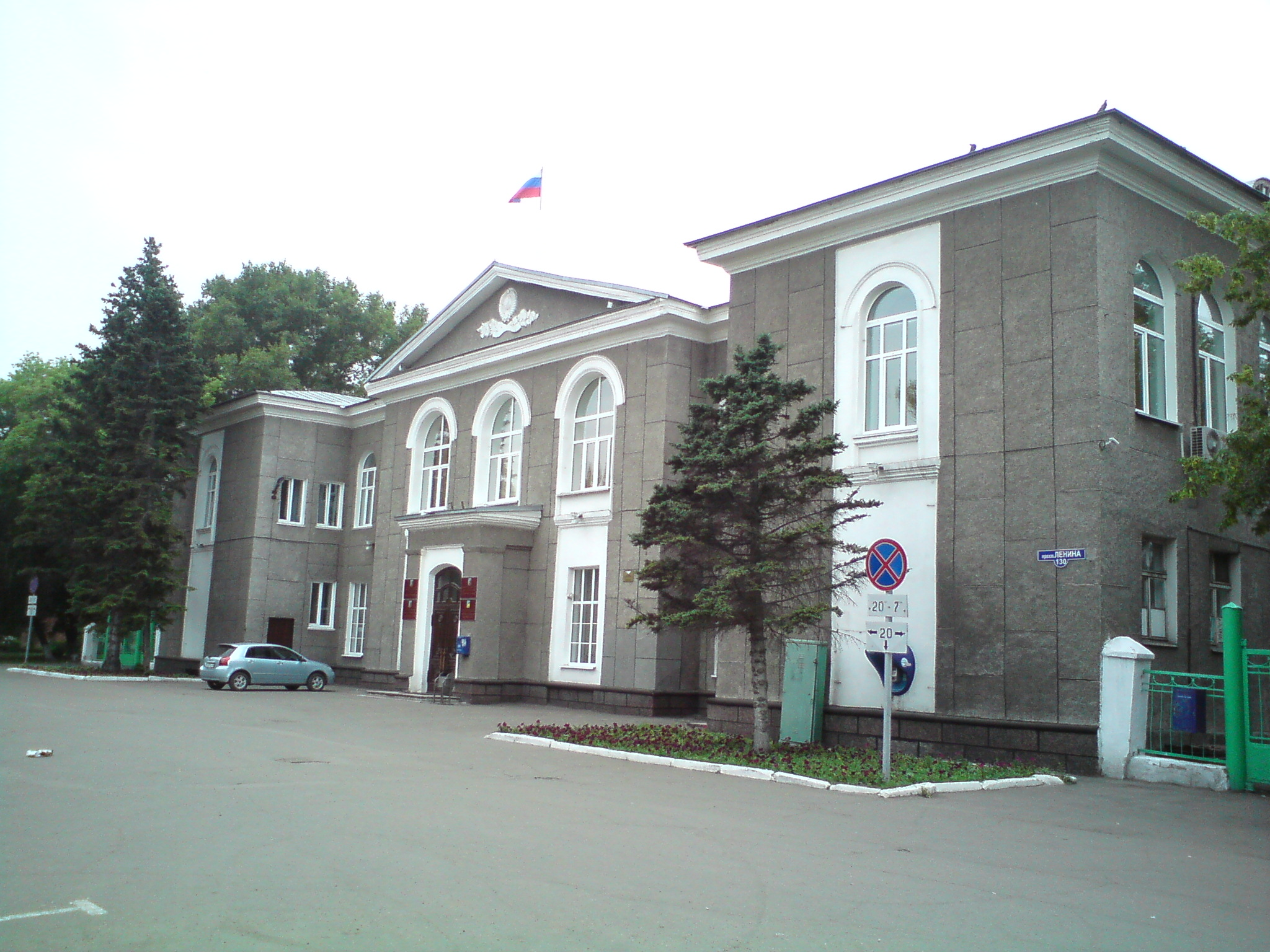 Алтайский край, г.Рубцовск, Администрация города